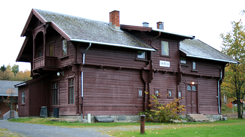 Skreia stasjon (gårdsida). Paul Due, 1902.